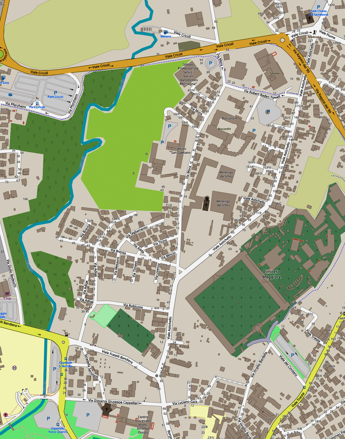 Mappa della Zona Astichello